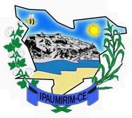 Brasao-Ipaumirim